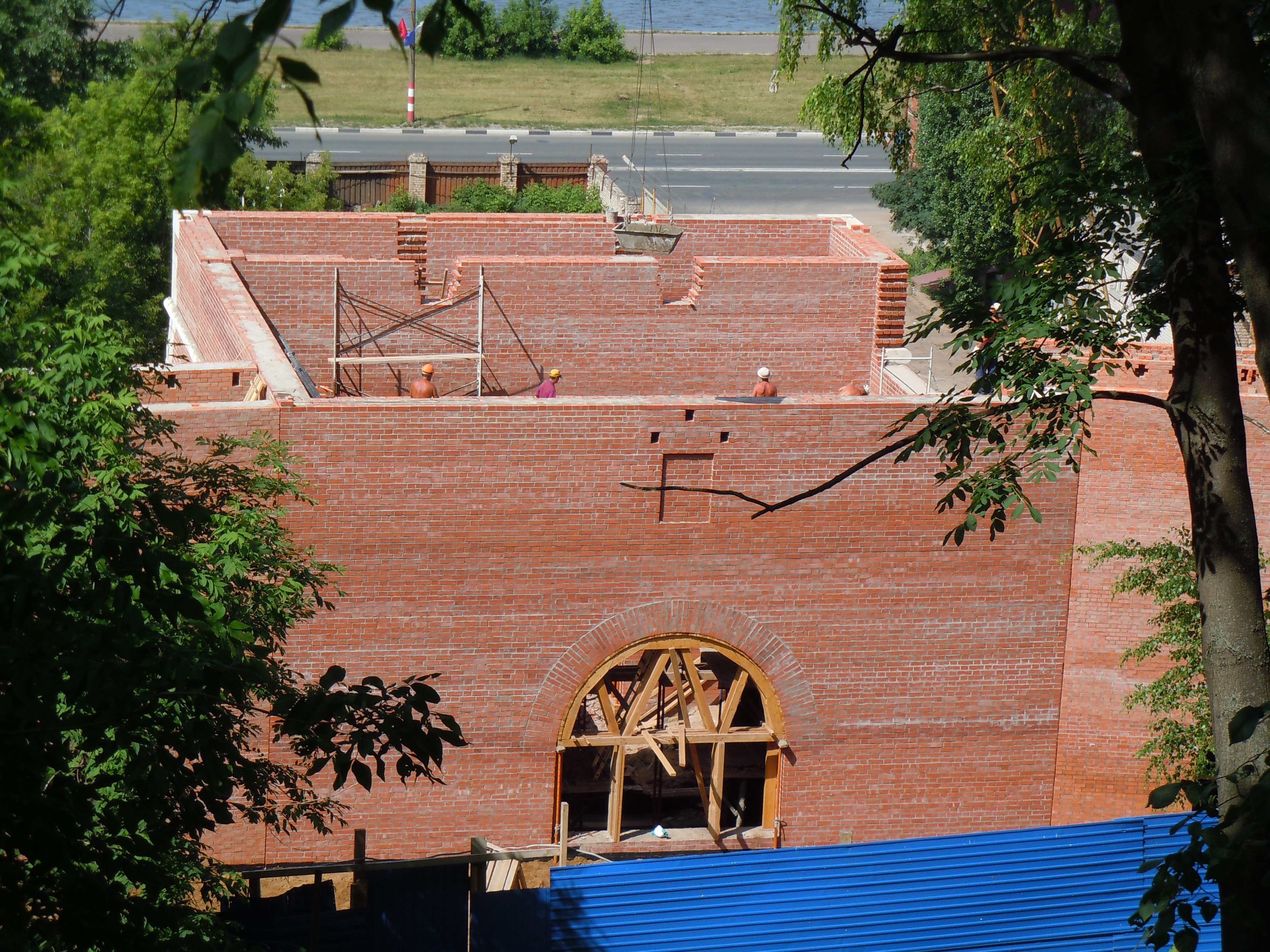 Реконструкция Зачатской башни.